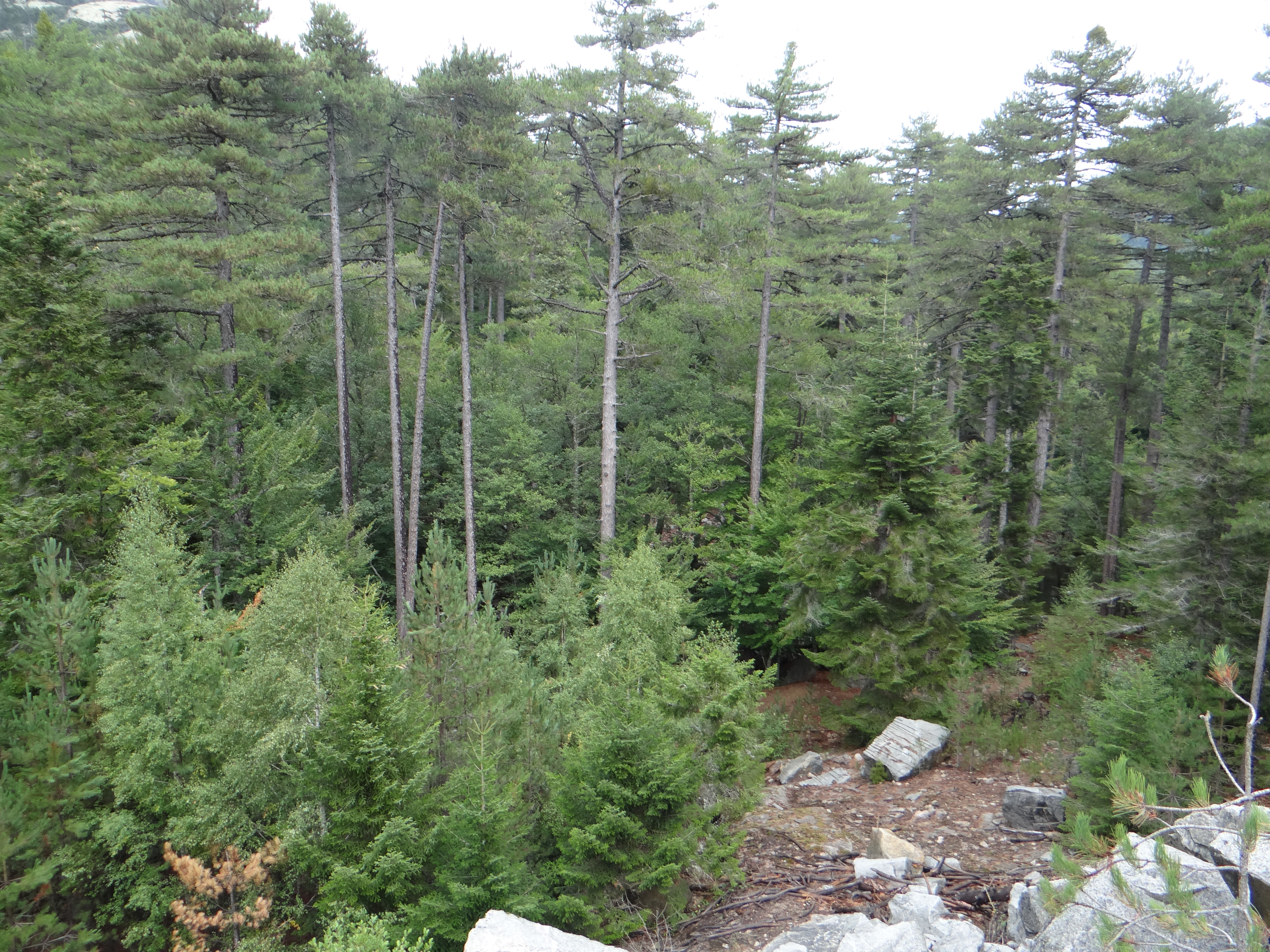 Paysage forestier vu depuis le « sentier de La Sittelle », a proximité de la ville d'Évisa (Corse). Ces boisements de pins laricios constituent l'habitat typique de la Sittelle corse